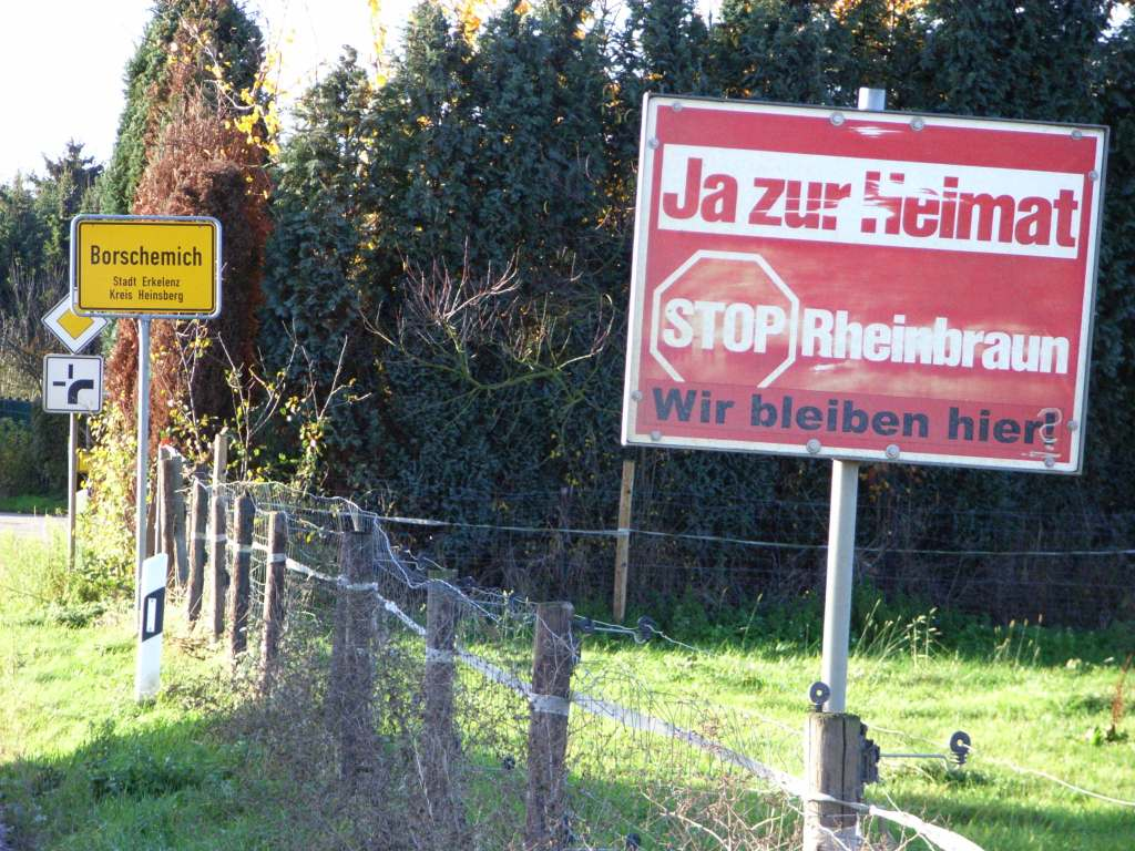 Erkelenz-Borschemich, Protestschild am Ortseingang